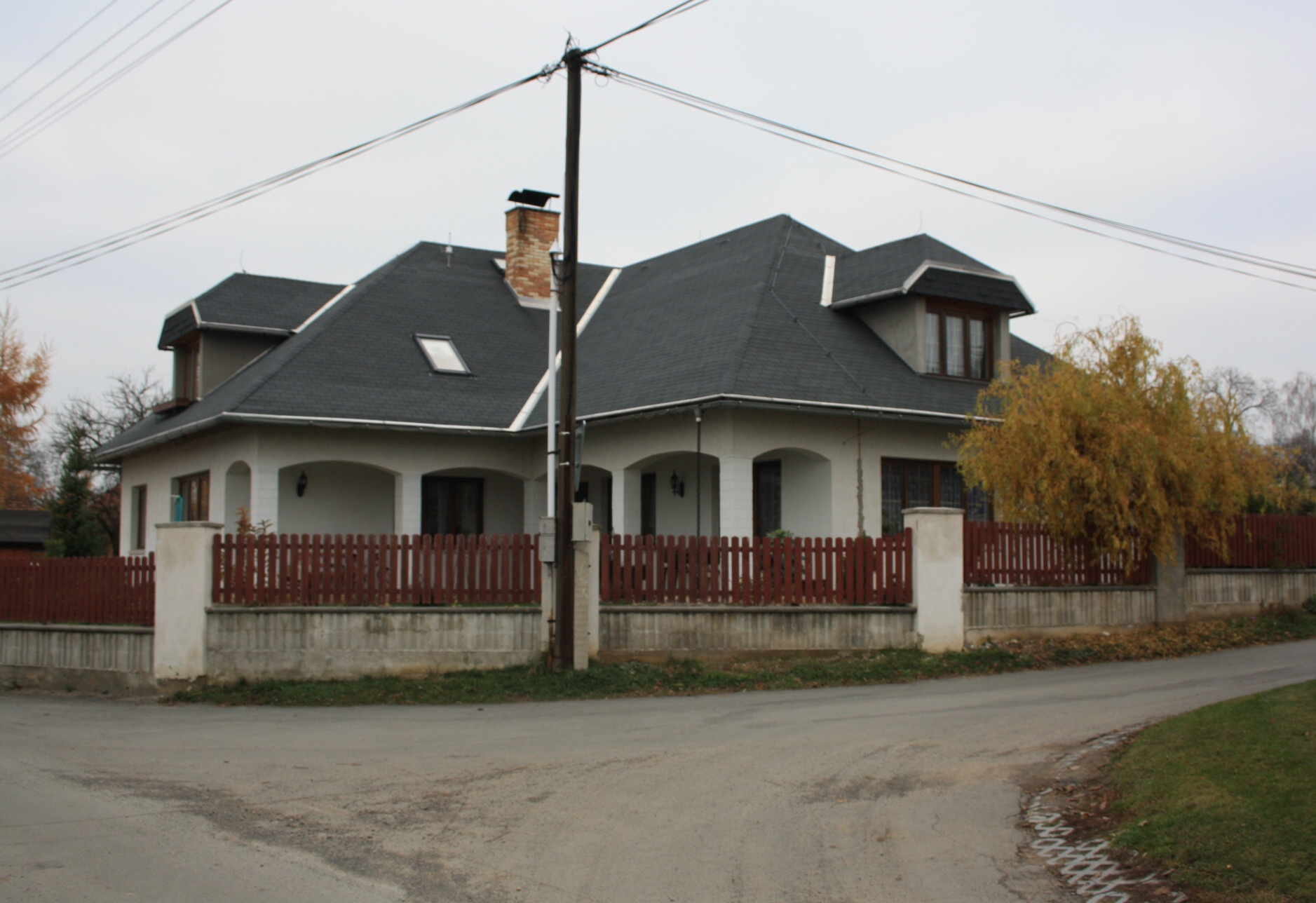 Dům číslo popisné 103 v Hoření Vinici, části obce Kly.